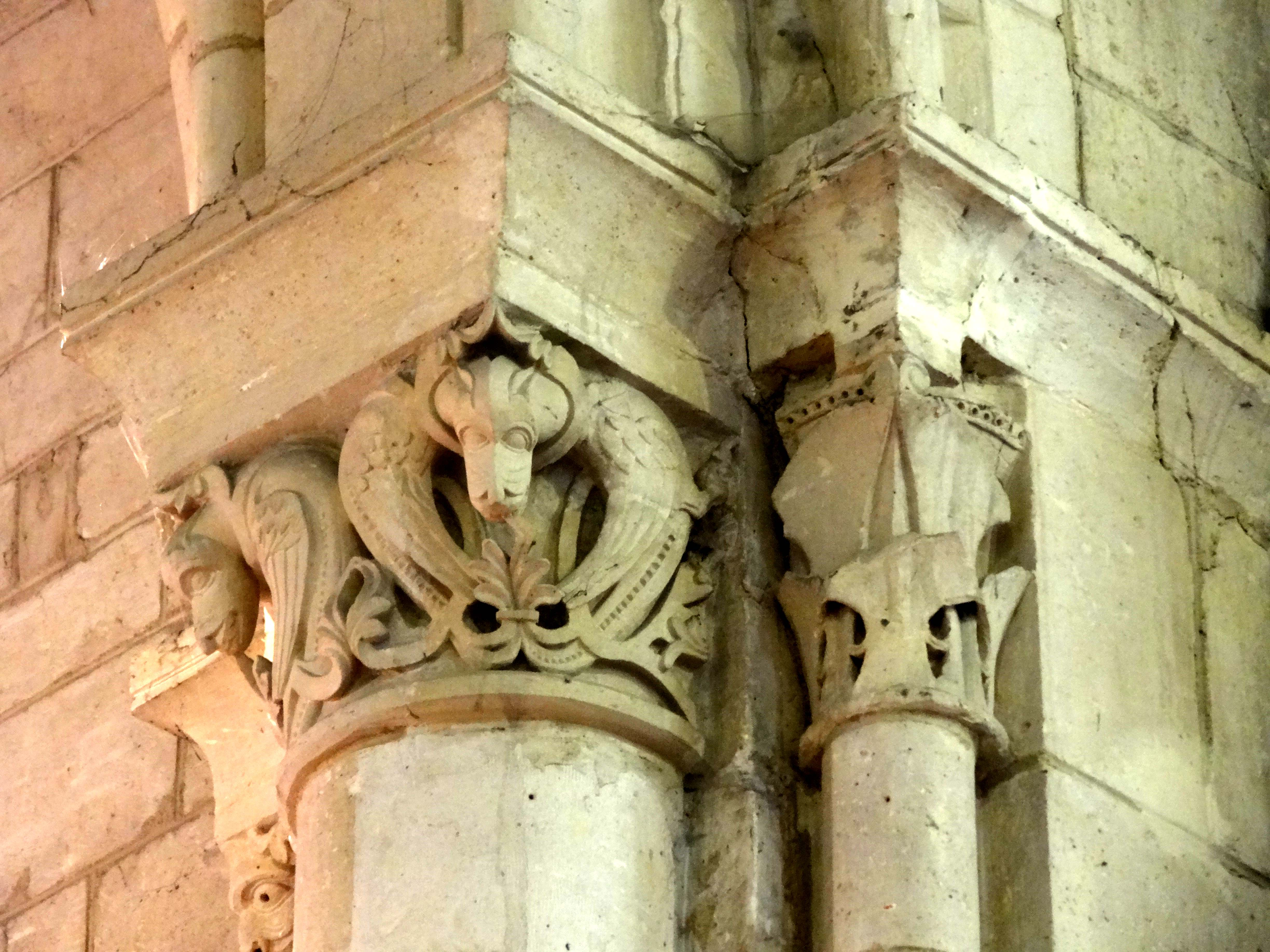 Chapiteaux de l'église - voir titre.